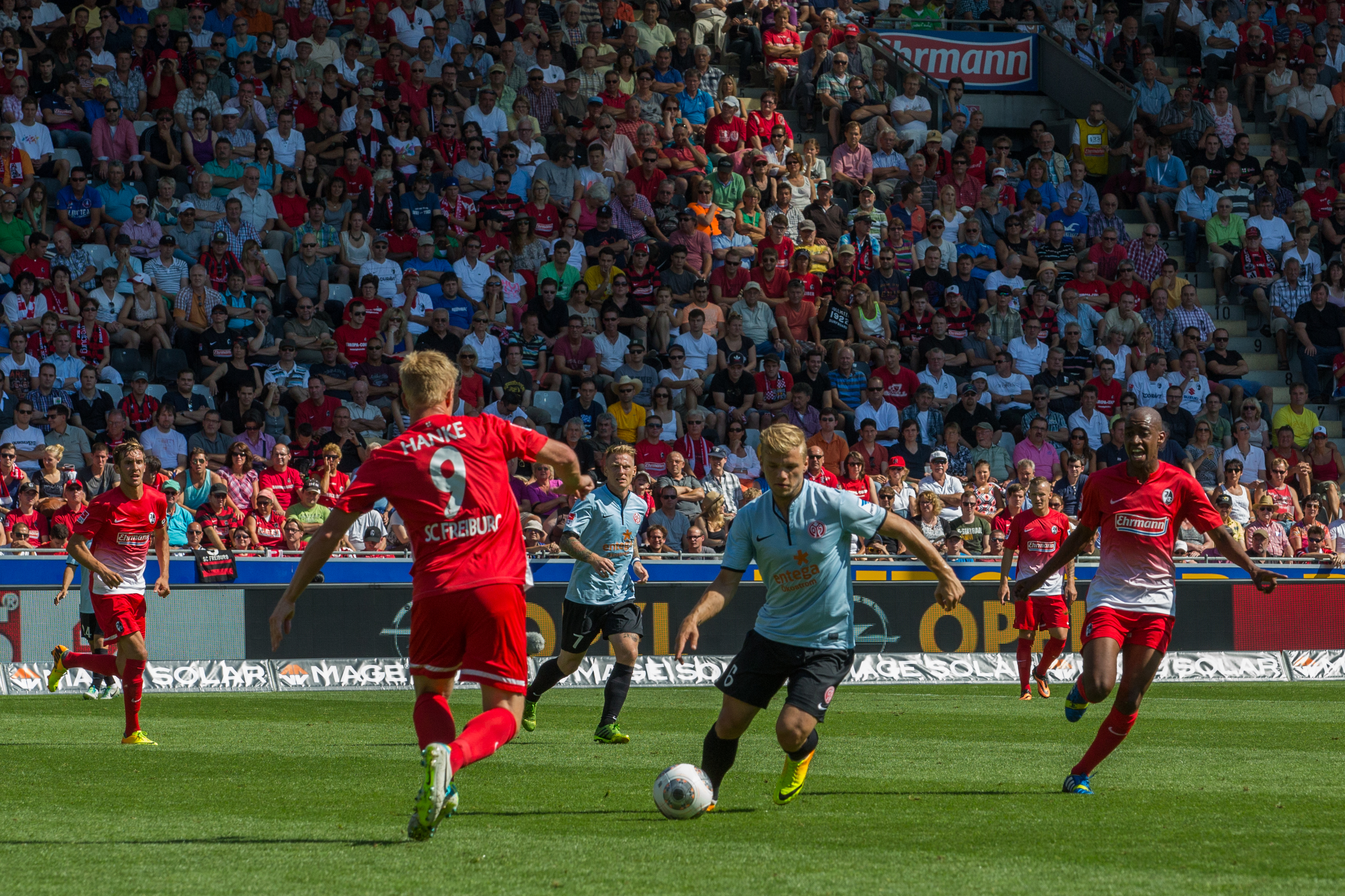 2ème journée de Bundesliga. Match SC Freiburg vs FSVMainz au MAGE SOLAR Stadion le samedi 17 août 2013.